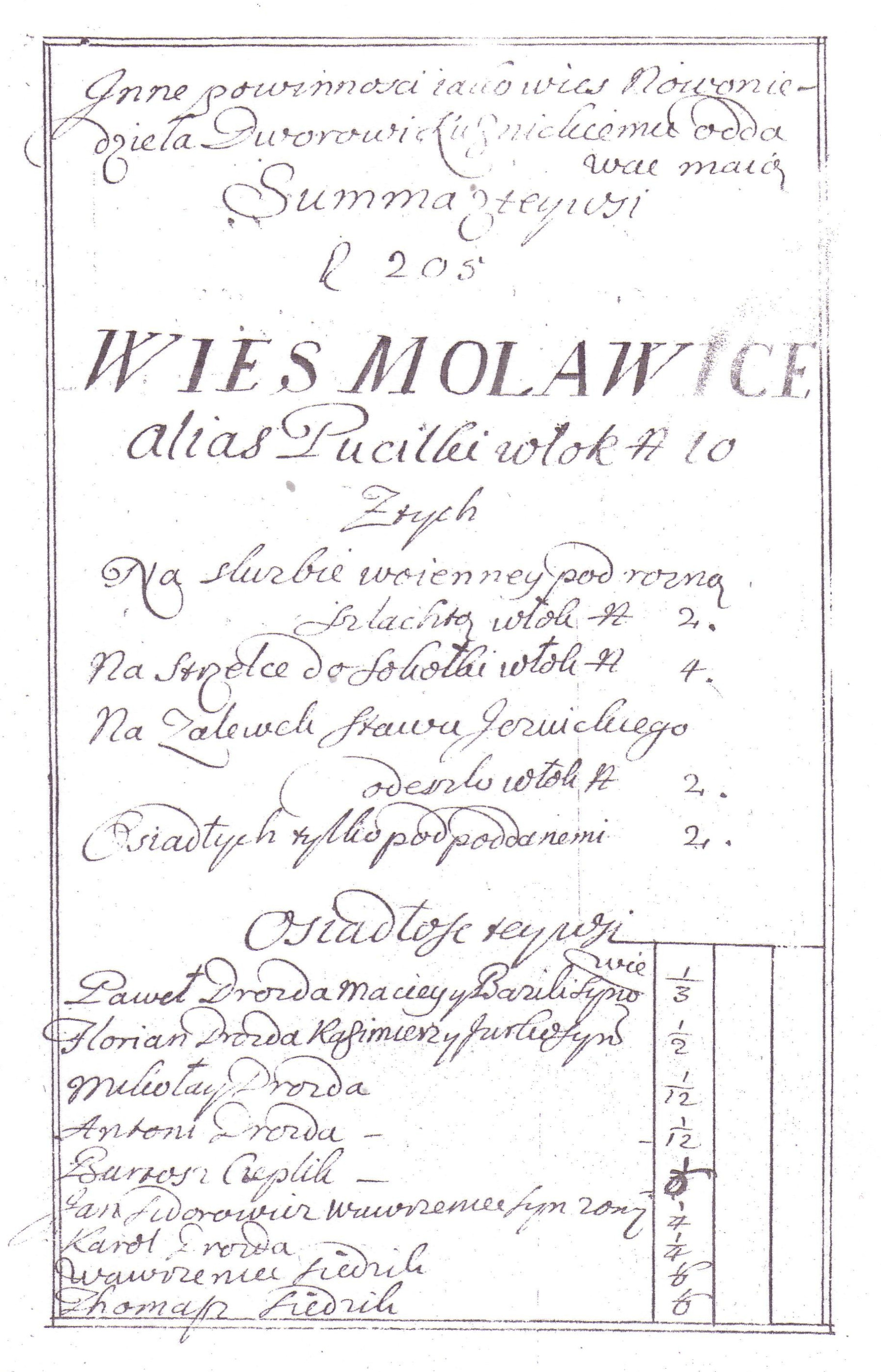 Strona dotycząca wsi Molawice alias Puciłki z dokumentu "Revisia generalna do Oekonomiey Grodzieńskiey Seymem Coronationis Cracoviensis Anni 1676 naznaczona a w roku 1679 et 1680 odprawiona"